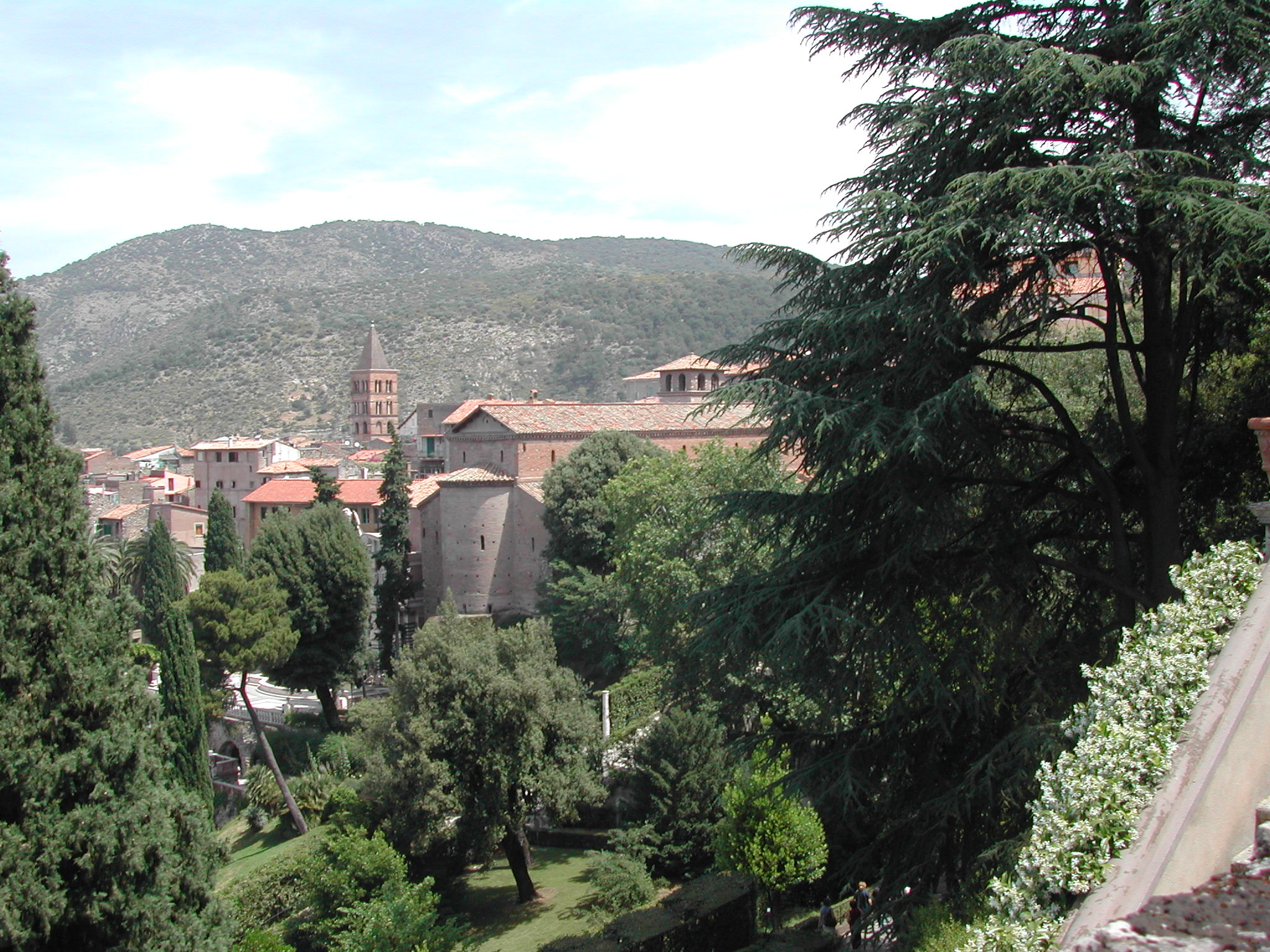 Tivoli, Villa d'Este: l'abside della chiesa di San Pietro alla Carità e il campanile della Cattedrale.